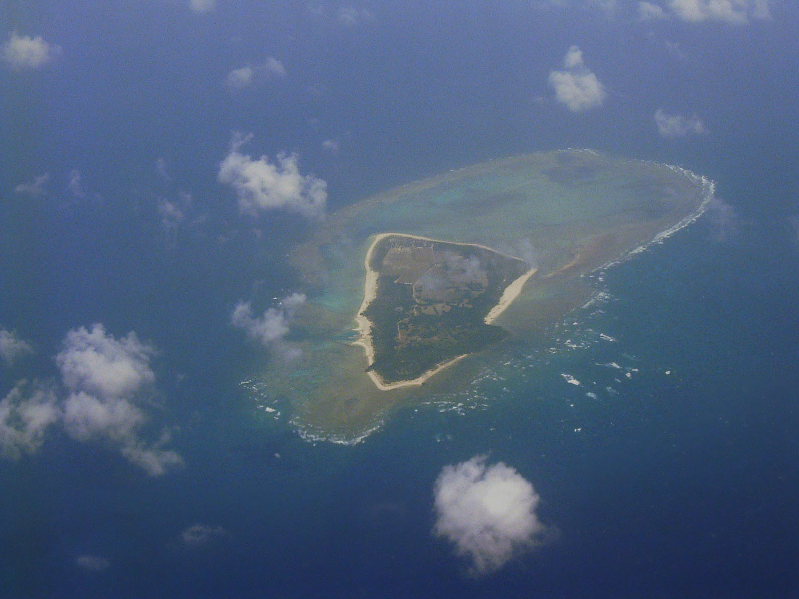 Minna Island, Tarama Village, Miyako District, Okinawa, Japan (沖縄県宮古郡多良間村水納島)